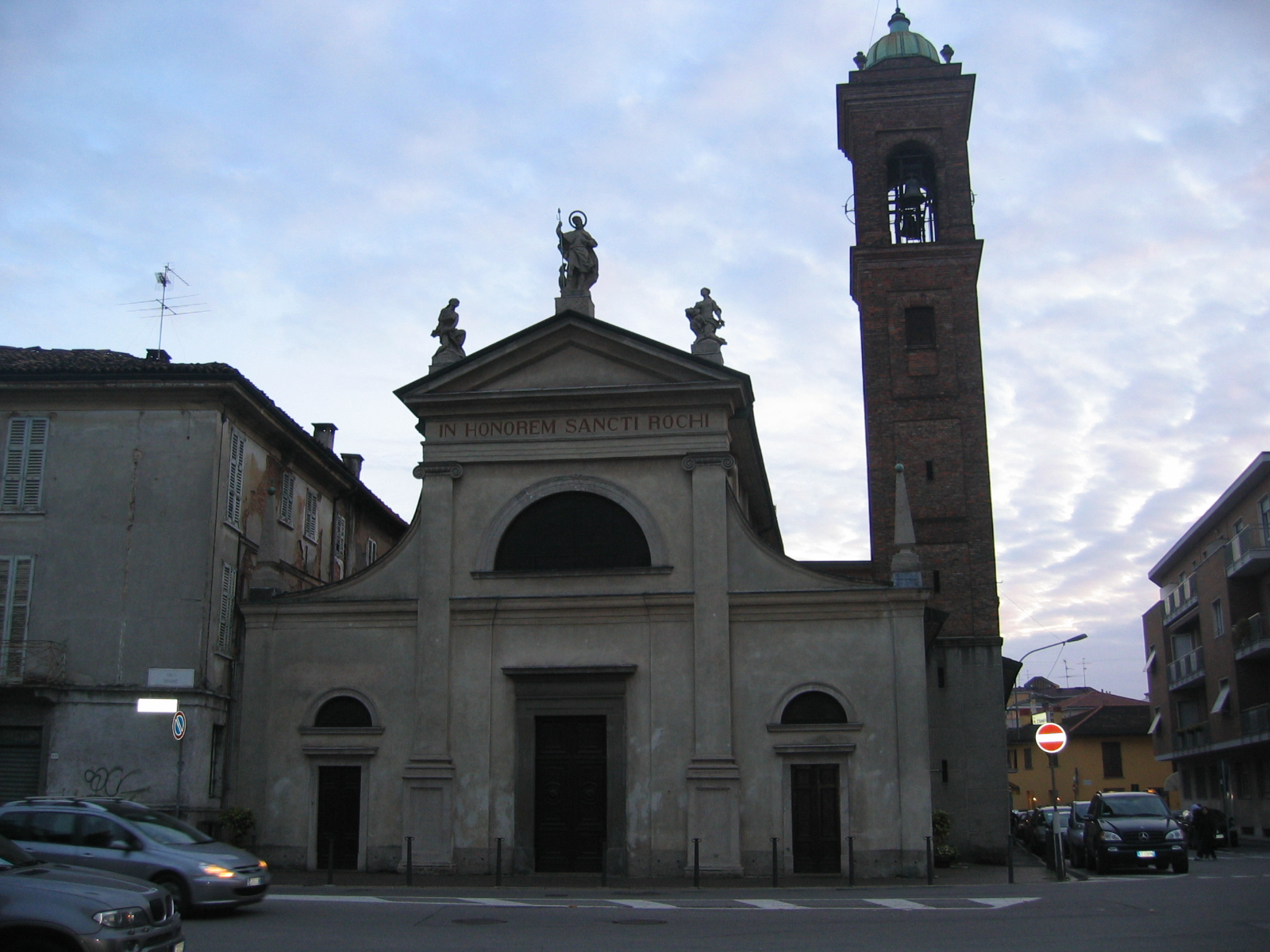 La chiesa di San Rocco, Treviglio